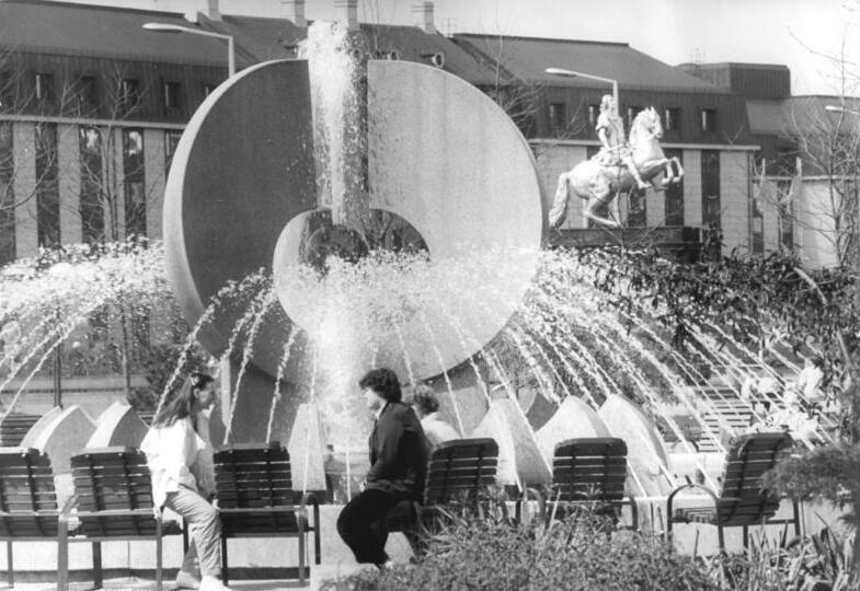 Dresden, Springbrunnen ADN-ZB Häßler 30.4.1986 Dresden: Brunnen-Sie plätschern wieder, die Brunnen auf Dresdens Boulevards und Plätzen. Am Neustädter Markt erfreuen diese Wasserspiele die Betrachter. 60 Brunnen, Fontänen und Wasserspiele verbreiten Beschaulichkeit in der Elbestadt. (siehe 1986-0430-017)